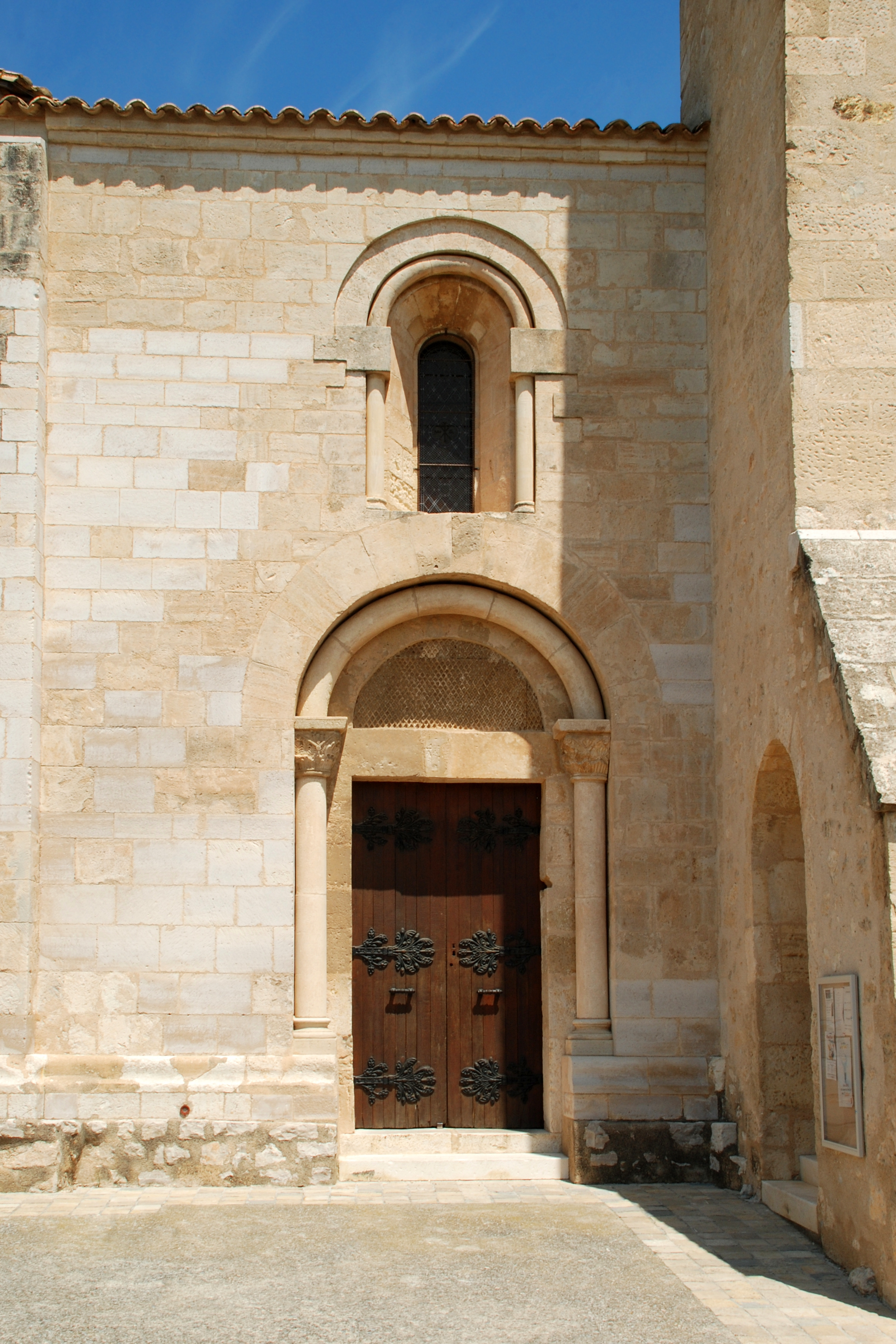 France - Languedoc - Hérault - Église Saint-Martial d'Assas